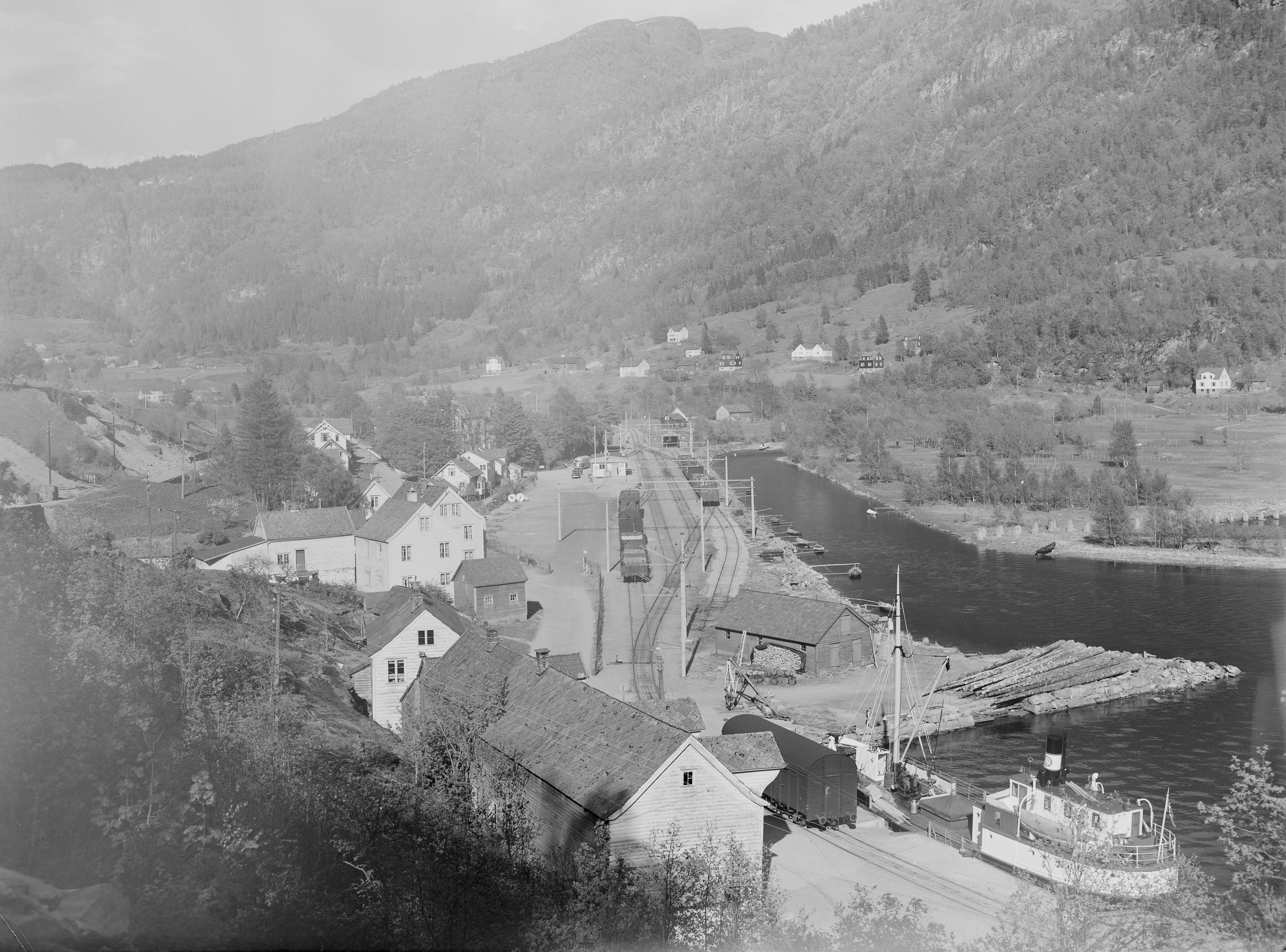 Bildet er hentet fra Nasjonalbibliotekets bildesamling. Anmerkninger til bildet var: Fotograf : ukjent Granvin, Granvin, Hordaland